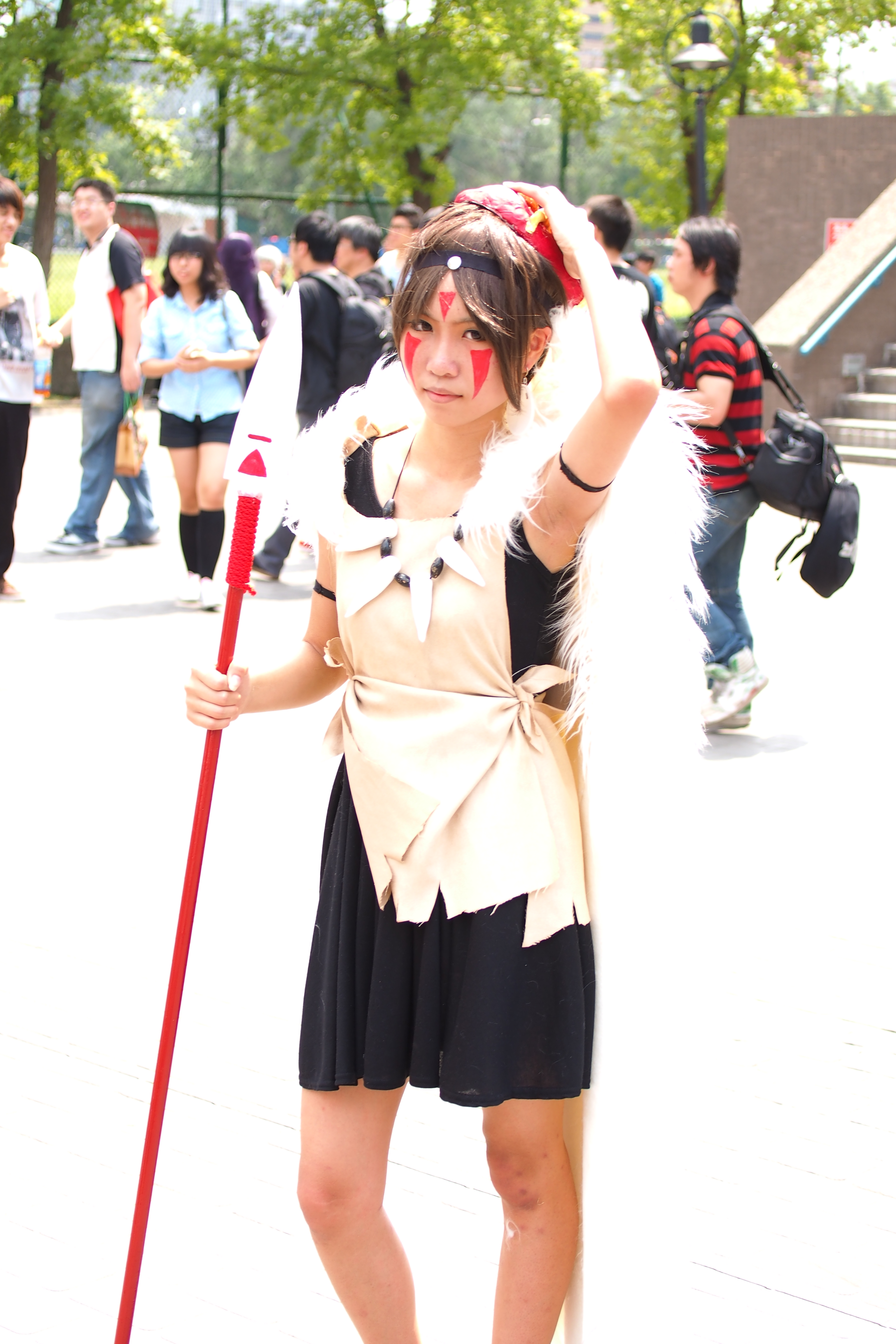 第22屆開拓動漫祭，《魔法公主》小桑cosplayer。